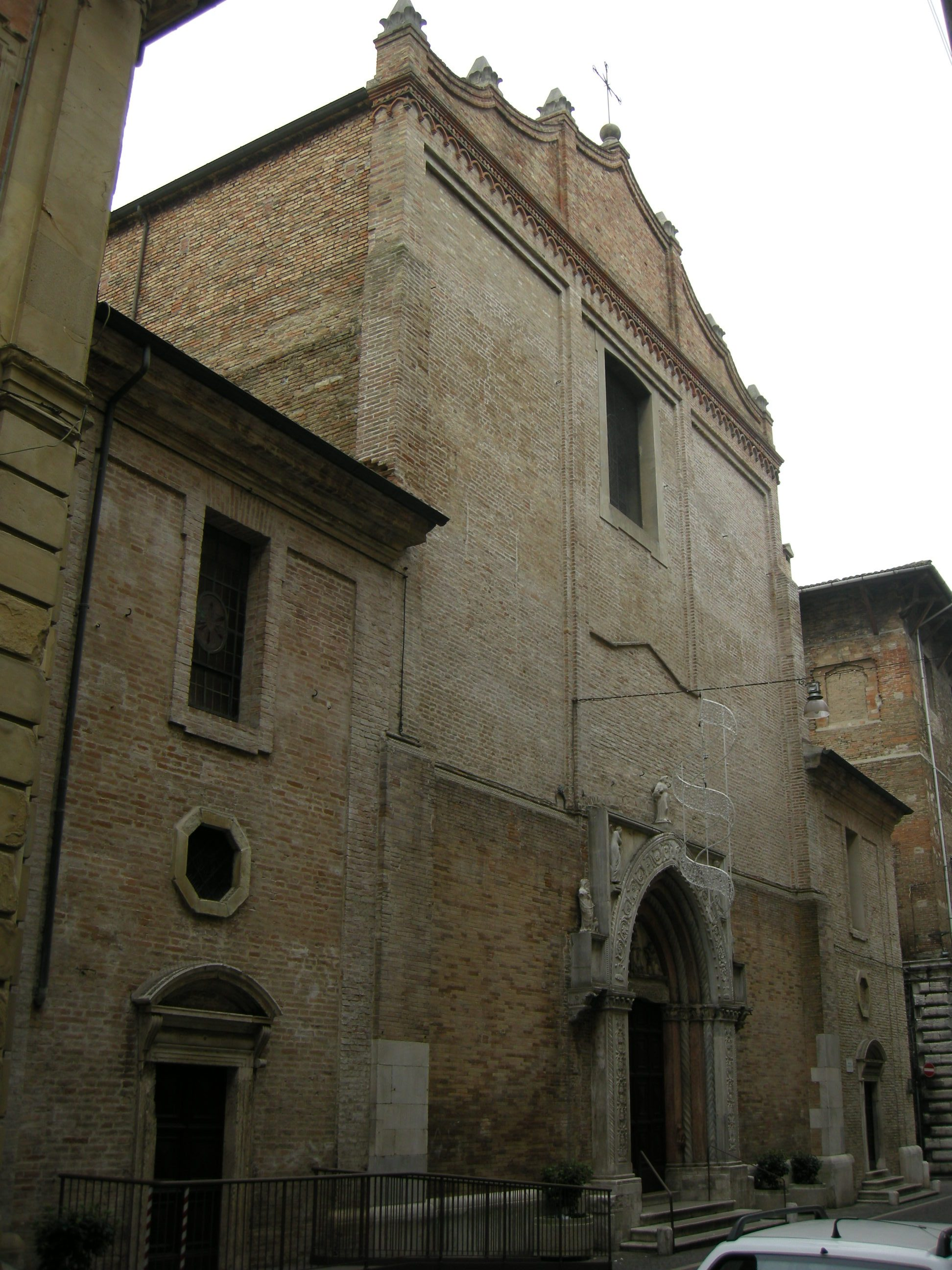 Pesaro, madonna delle grazie